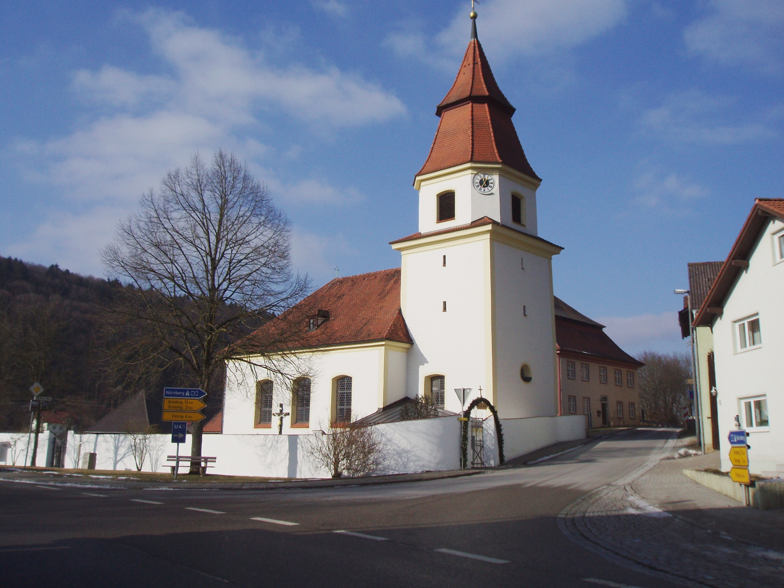 Kirche St. Nikloaus Altdorf Anlautertal Landkreis Eichstätt